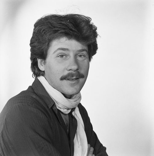 Bill van Dijk